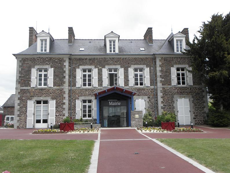 Mairie d'Iffendic (35).